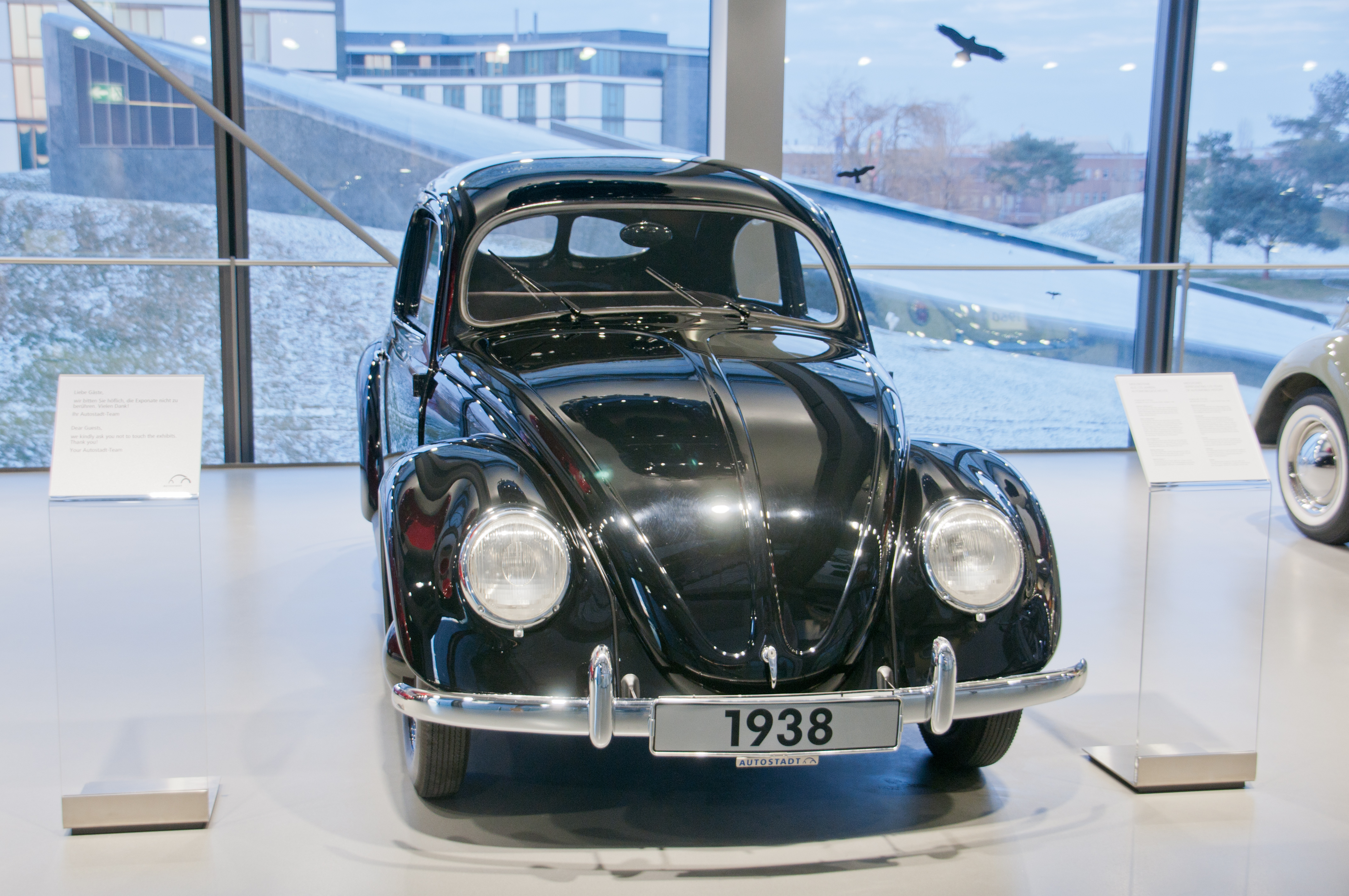 Autostadt Wolfsburg